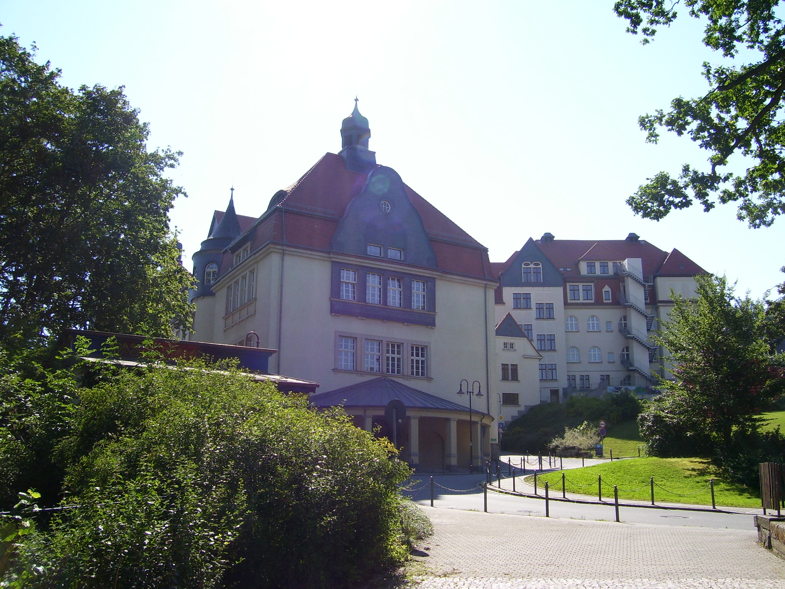 Goethe - Gymnasium Sebnitz vom "Alten Friedhof" aus gesehen. Blick auf so genanntes "Haus I"